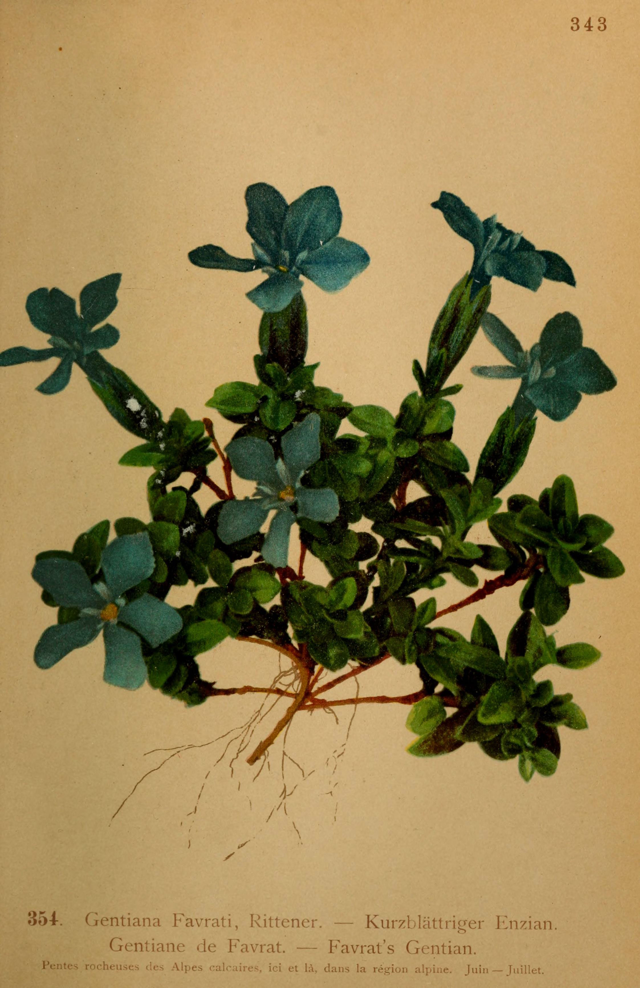 343 354. Gentiana Favrati, Rittener. — Kurzblâttriger Enzian. Gentiane de Favrat. — Favrat's Gentian. Pentes rorheiws ,!.-. .\1t.*". ,^-,!,.,, ■,-,.. ;,.; ..j là, dans la région alpine. Juin — Juillet.